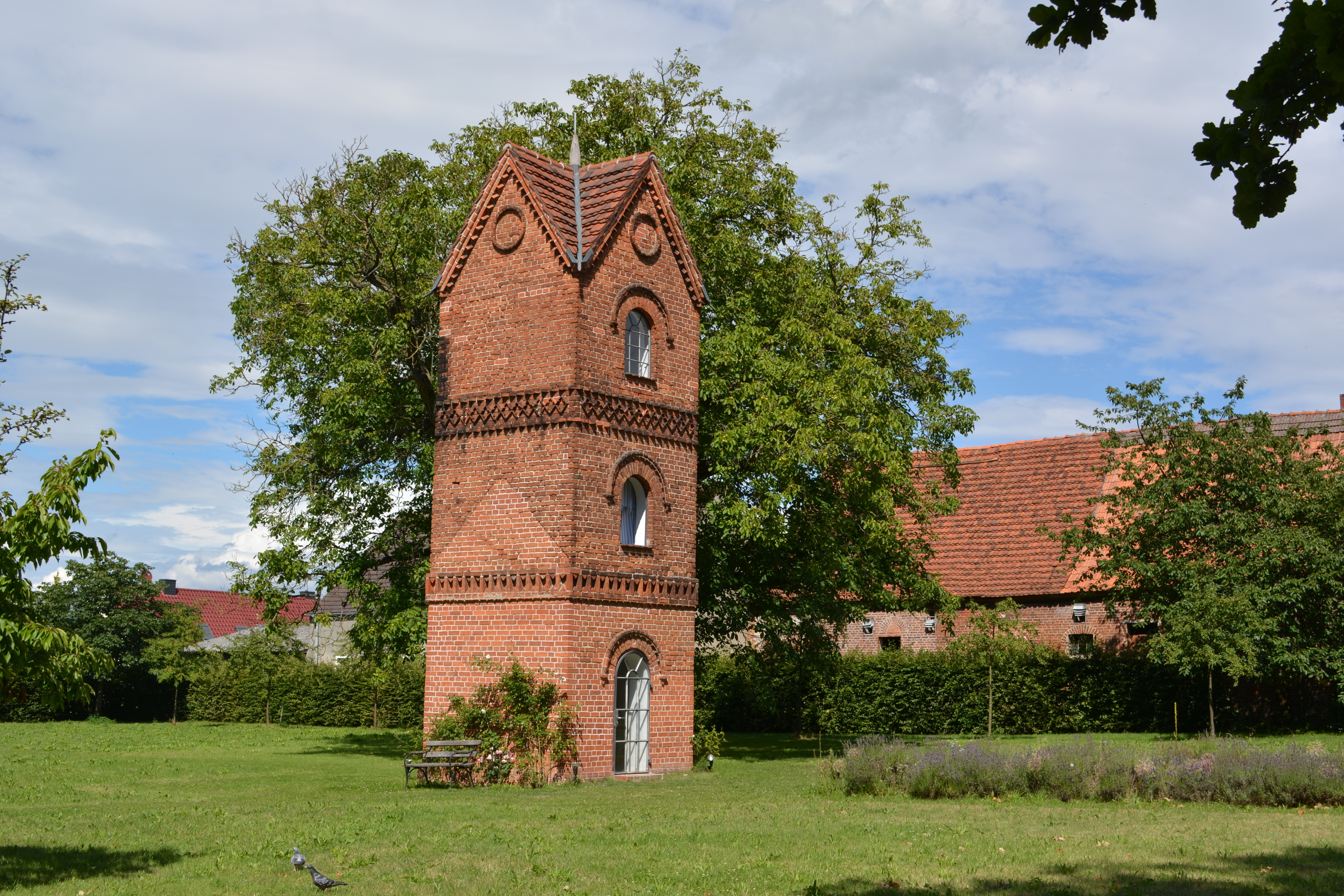 Denkmalgeschützter Taubenturm auf dem Wirtschaftshof des Herrenhauses in Kleßen, Landkreis Havelland